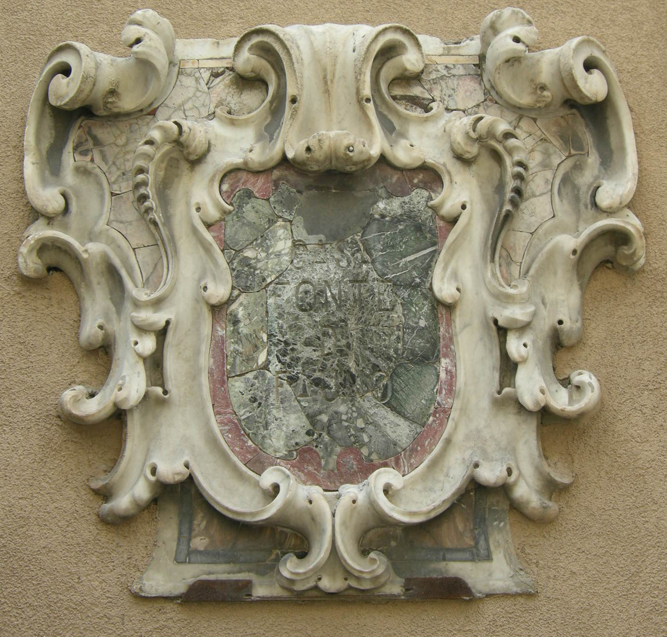 Taormina, stemma